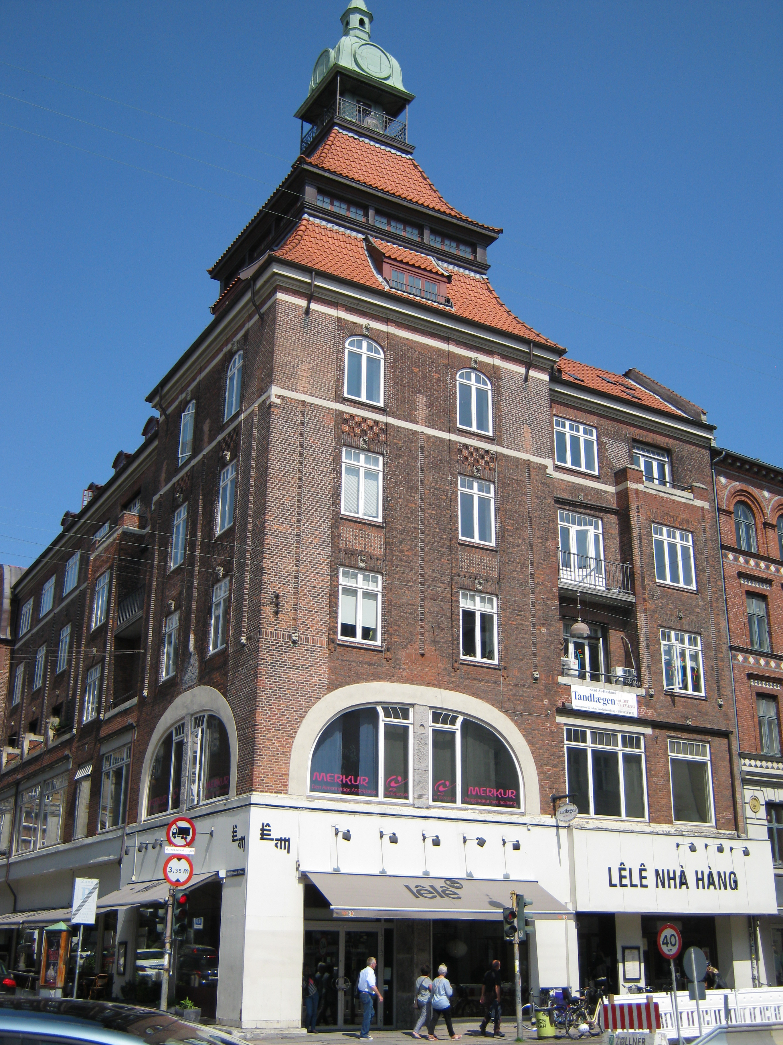 Vesterbrogade 40 in Copenhagen, Denmark. Built in 1909 to a design by Anton Rosen.